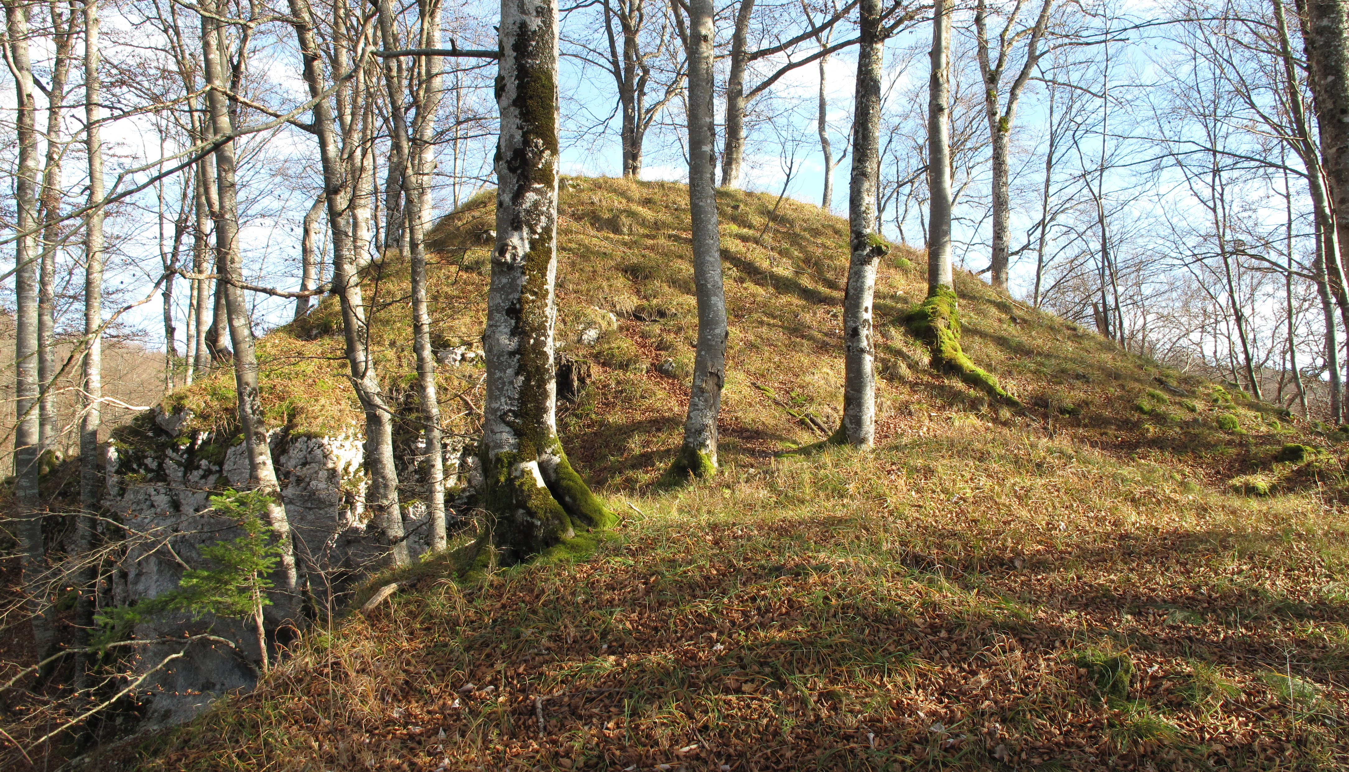 Südwestseite der Kernburg.